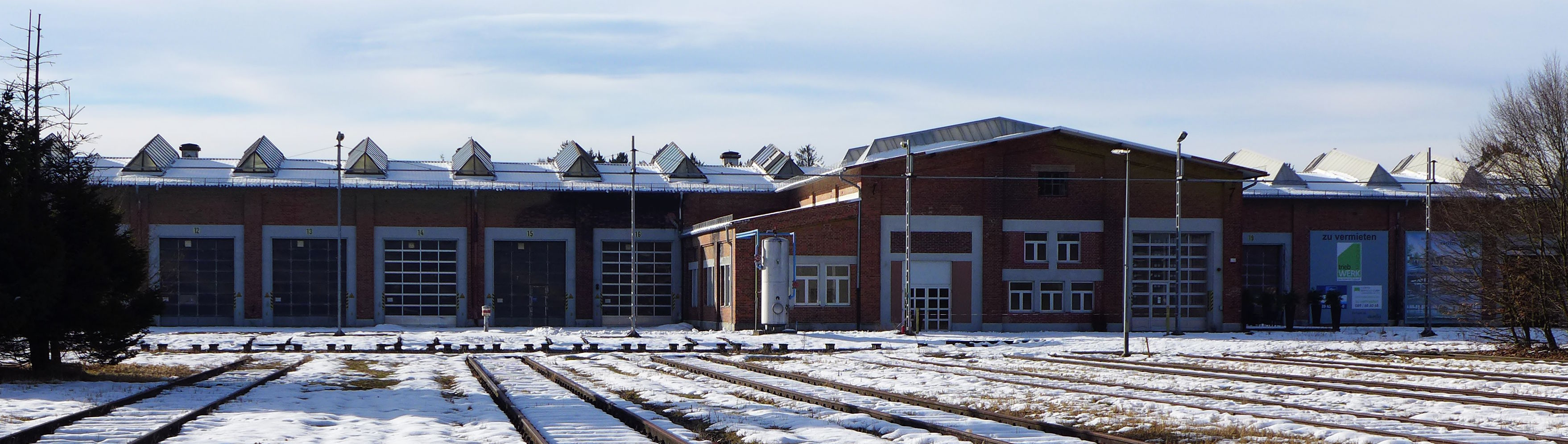 ehemalige Halle 3 (Südliche Wagenreparaturwerkstatt) im Eisenbahn-Ausbesserungswerk Neuaubing in München-Neuaubing, Papinstraße 53; erbaut 1921-1927; unter Denkmalschutz